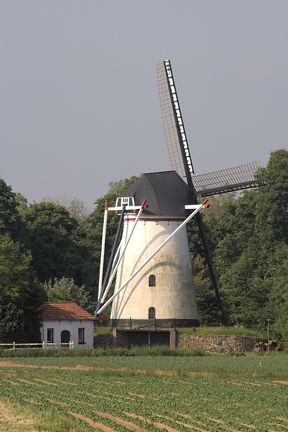 Kekerdom: Molen De Duffelt